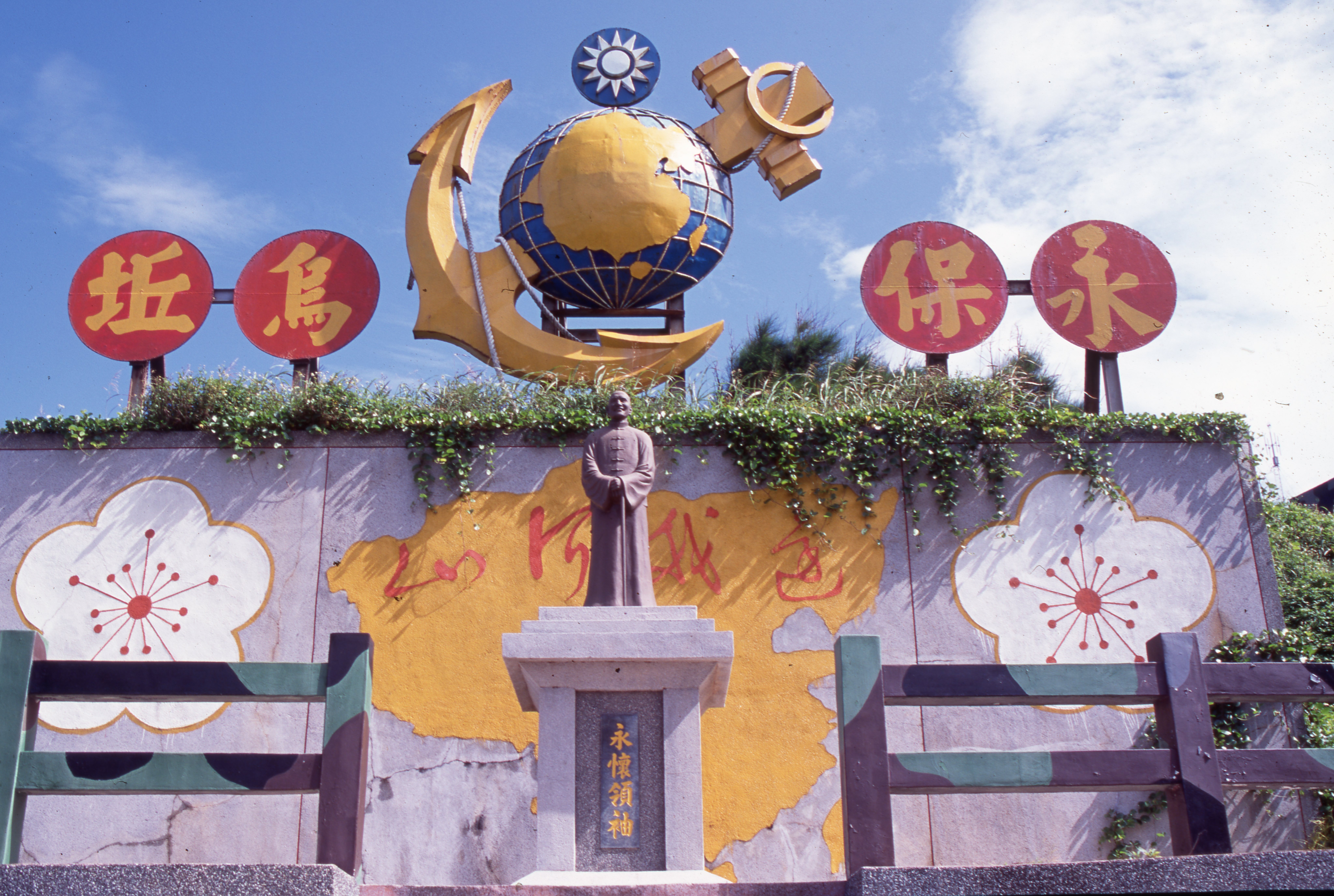 烏坵嶼位於金門與馬祖列嶼之間，目前由金門縣政府代管，台灣到烏坵嶼的交通以船舶為主，進出港從台中港最便利。